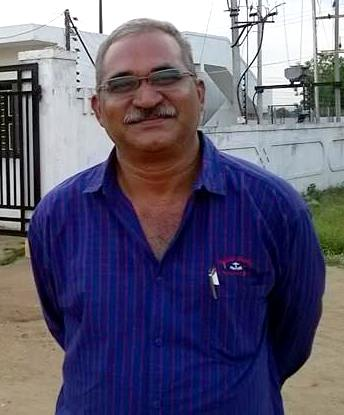 వాసిరెడ్డి వేణుగోపాల్